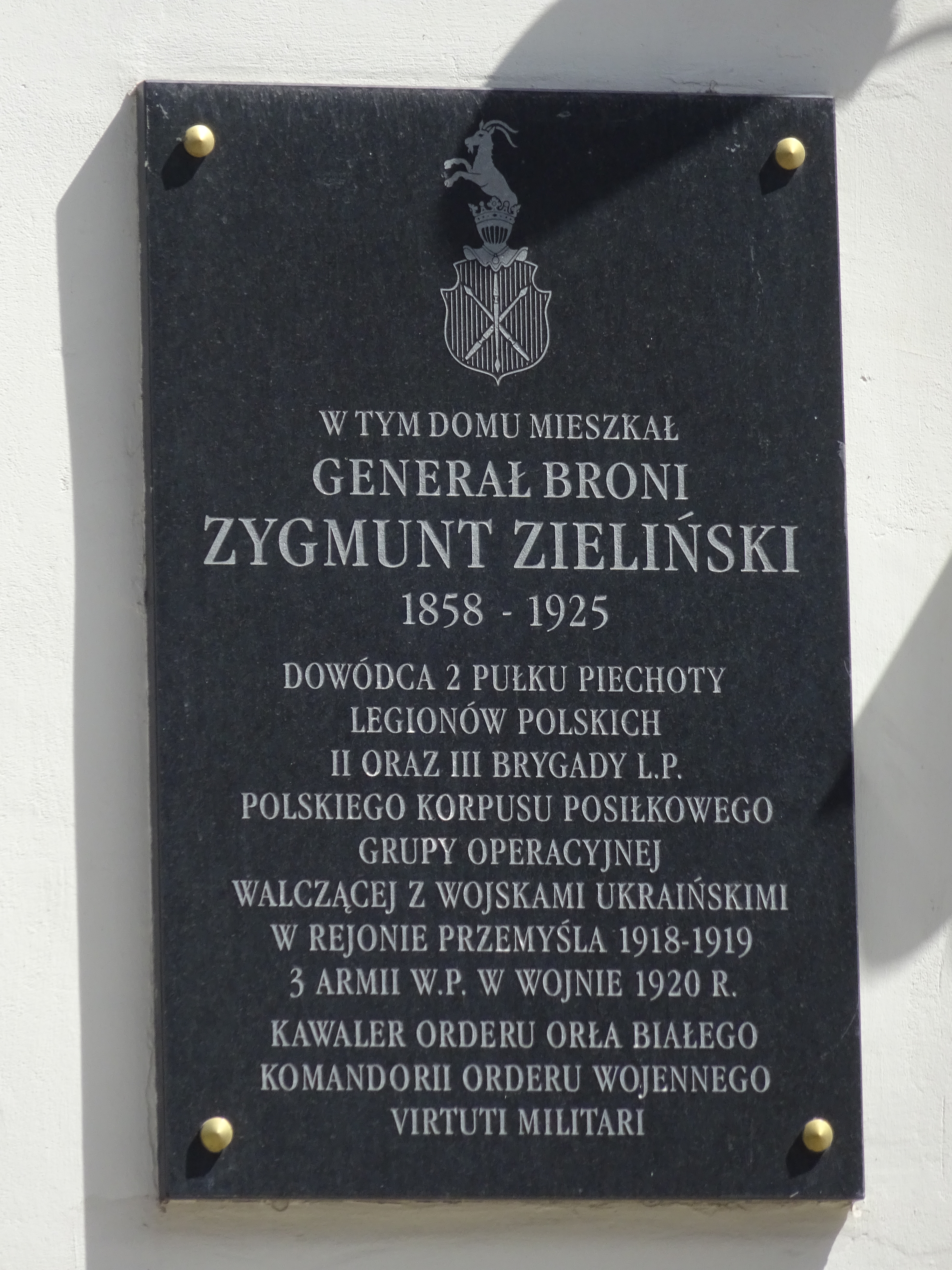 Ulica Garncarska 4 - tablica upamiętniająca zamieszkiwanie owej kamienicy przez generała broni Zygmunta Zielińskiego. Kraków, 2018.